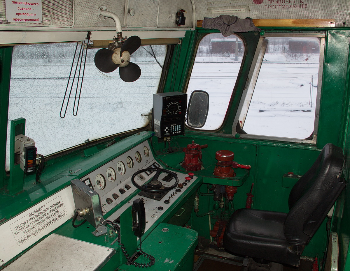 Интерьер кабины тепловоза ТЭП70-0352